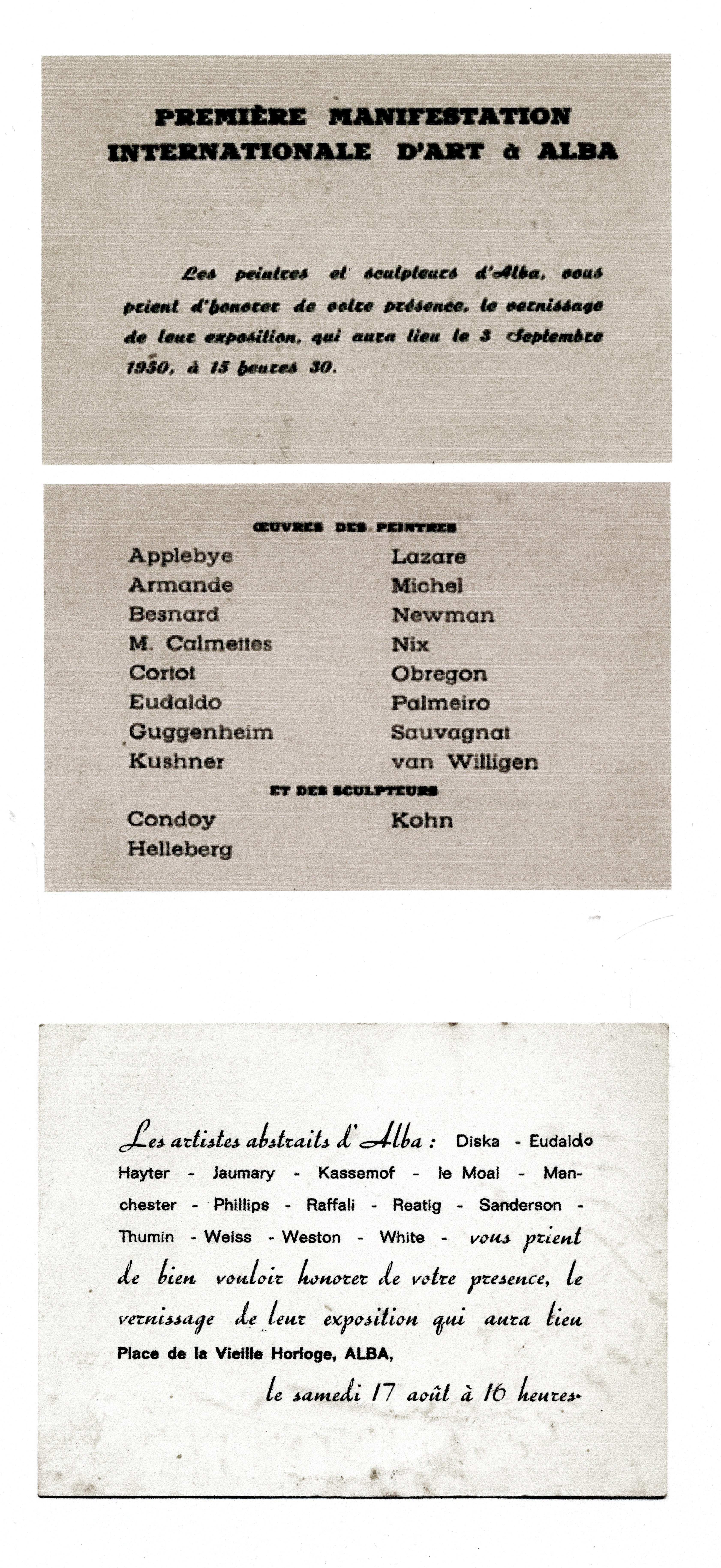 Invitations des années 1950 pour des expositions réunissant des artistes d'Alba-la-Romaine